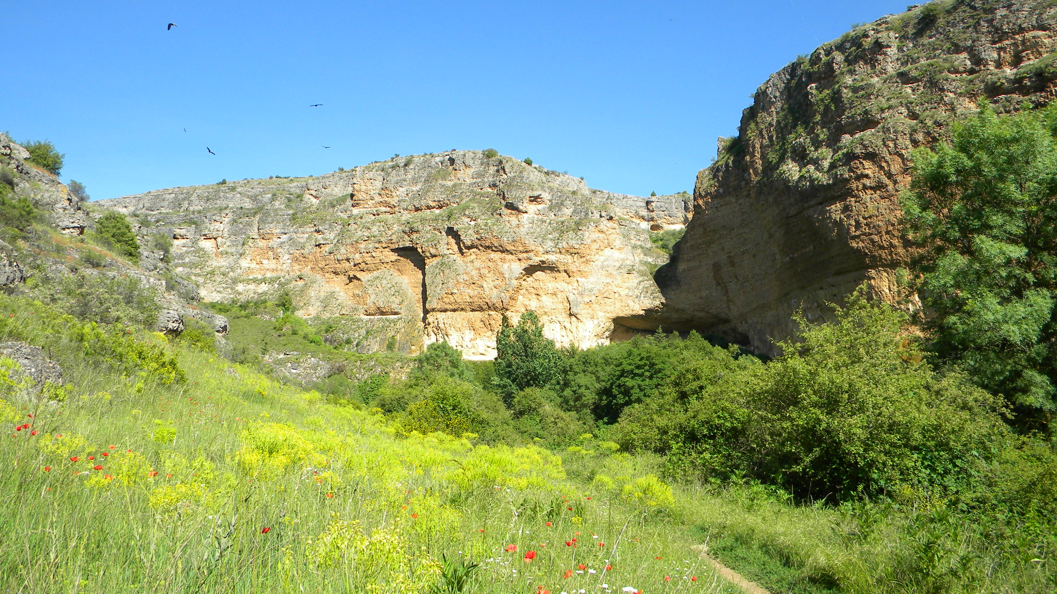 Zona de las Hoces del Rio Duraton "Villar de Sobrepeña"